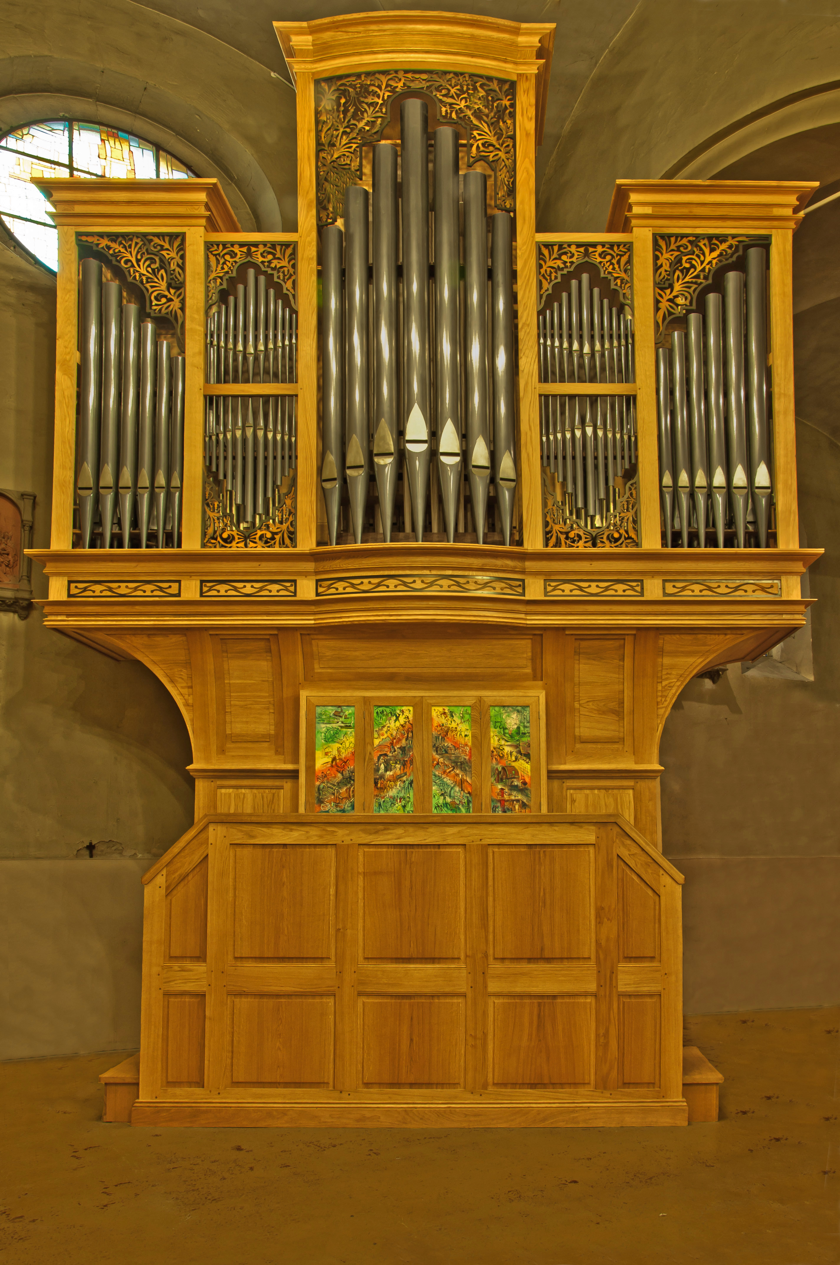 Orgue inauguré en 2011